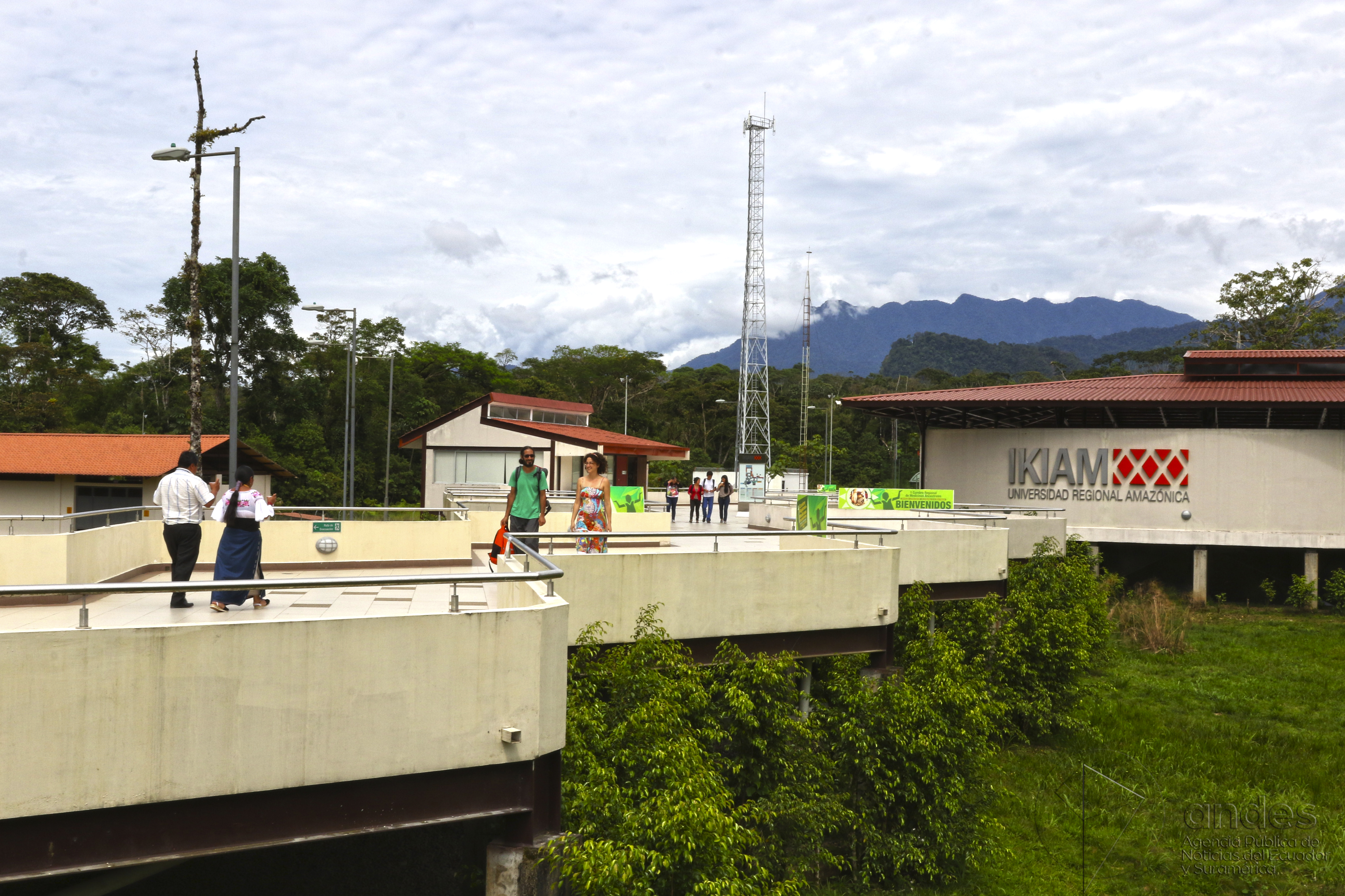 Tena (Napo), 12 ago (Andes).- IKIAM que en lengua shuar significa "selva" es una universidad de investigación y formación de profesionales especializados en Ciencias de la Vida, Ciencias de la Tierra y Ciencia de los Asentamientos Humanos. está situada en la Amazonía ecuatoriana, a 6 kilómetros de la ciudad de Tena, en la provincia de Napo. Cuenta con aproximadamente 260 estudiantes de las 24 provincias del Ecuador. ANDES/Micaela Ayala V.